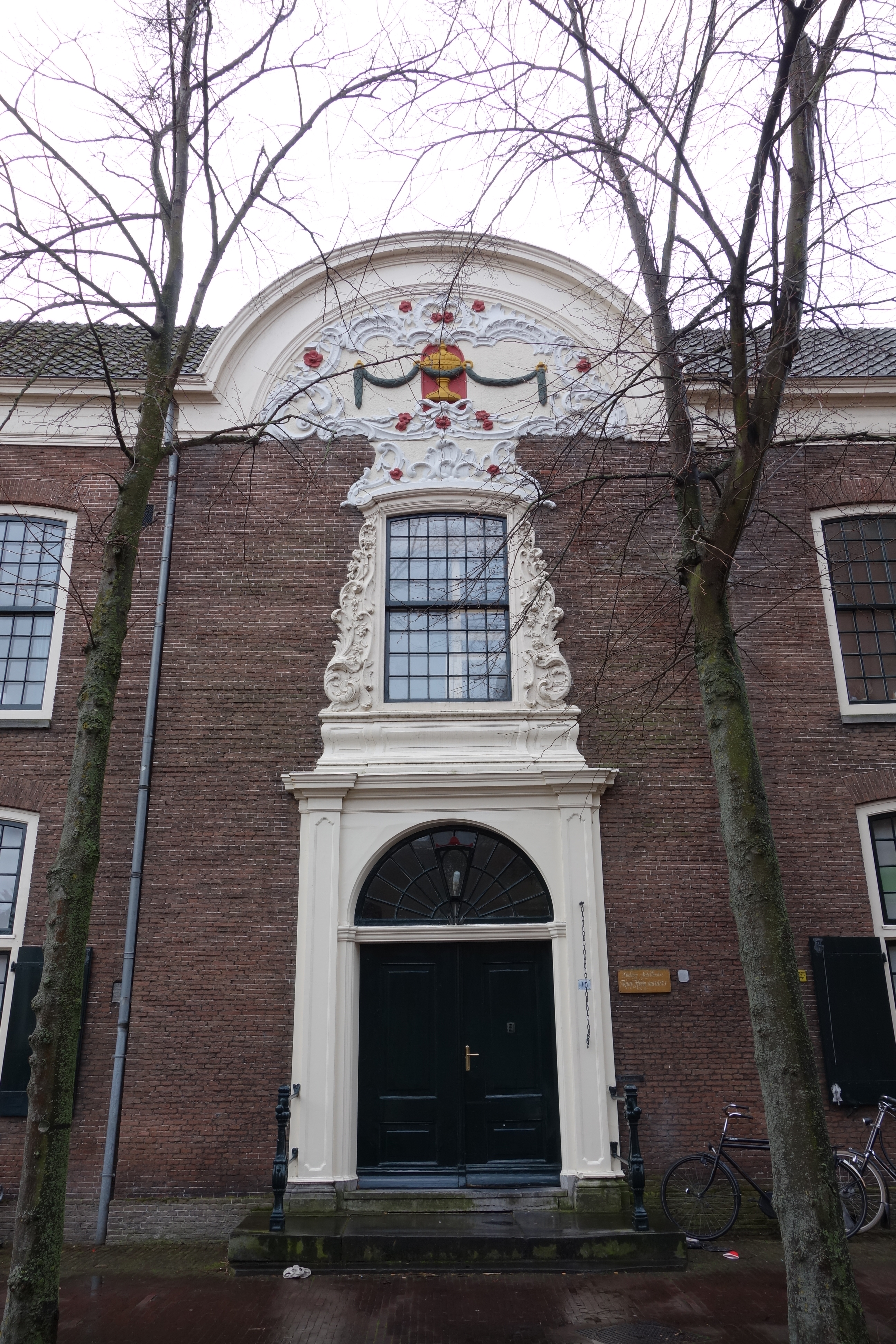 Voordeur en poort van het voormalige rooms-katholieke wees- en armenhuis Sint Jozef in Hoorn.